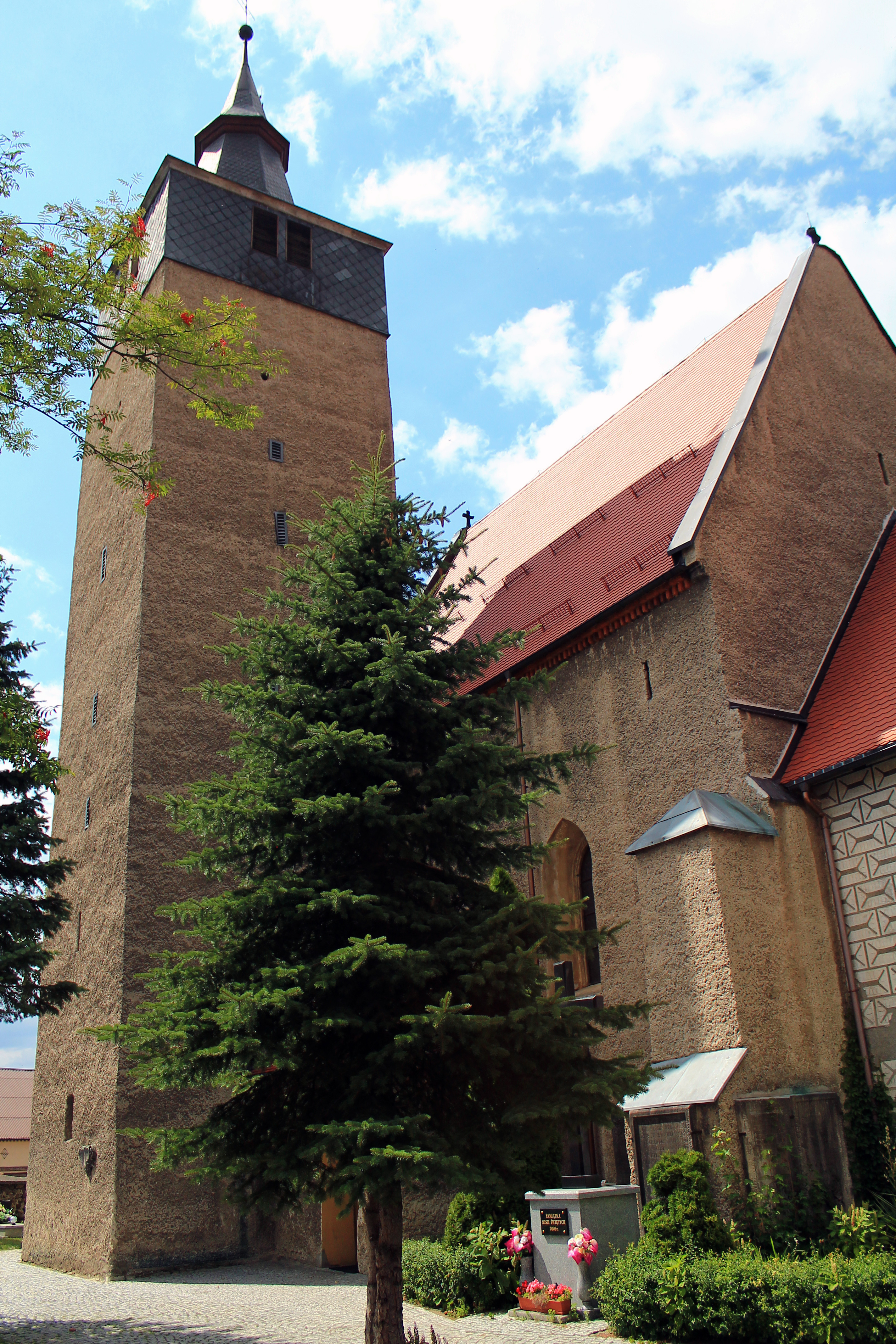 Olszany, gmina Strzegom. Kościół katolicki pw. Świętej Trójcy.